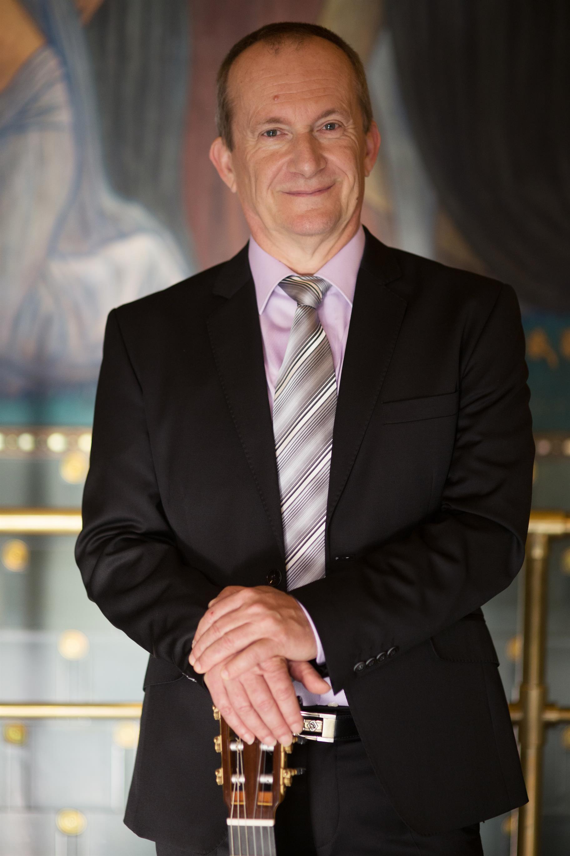 Eötvös József - fotó: Raffay Zsófia